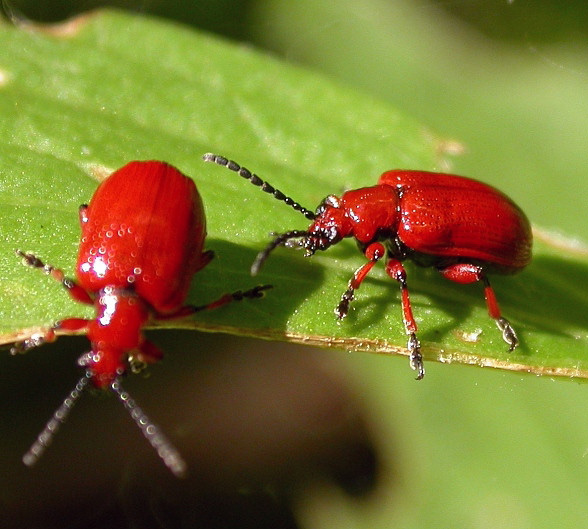 Maiglöckchenhähnchen, Lilioceris merdigera, Nationalpark Hainich, Thüringen, Baumwipfelpfad, Germany